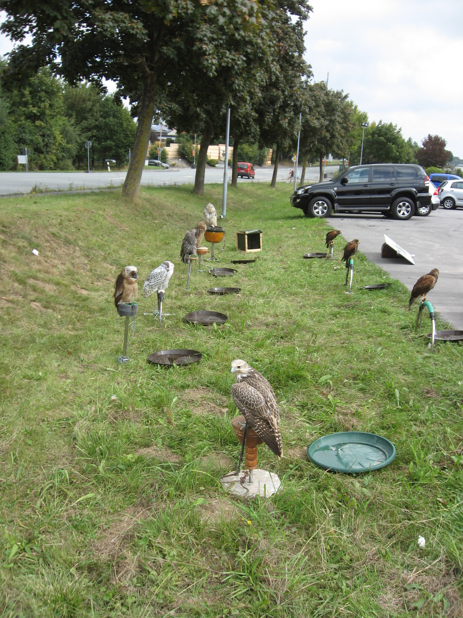 Greifvogelschau beim Jubiläum des Autohauses Biederbick in Brilon, NRW, D.. Vögel auf Rasenstreifen zwischen Parkplatz (rechts) und Bundesstraße 7 (links).